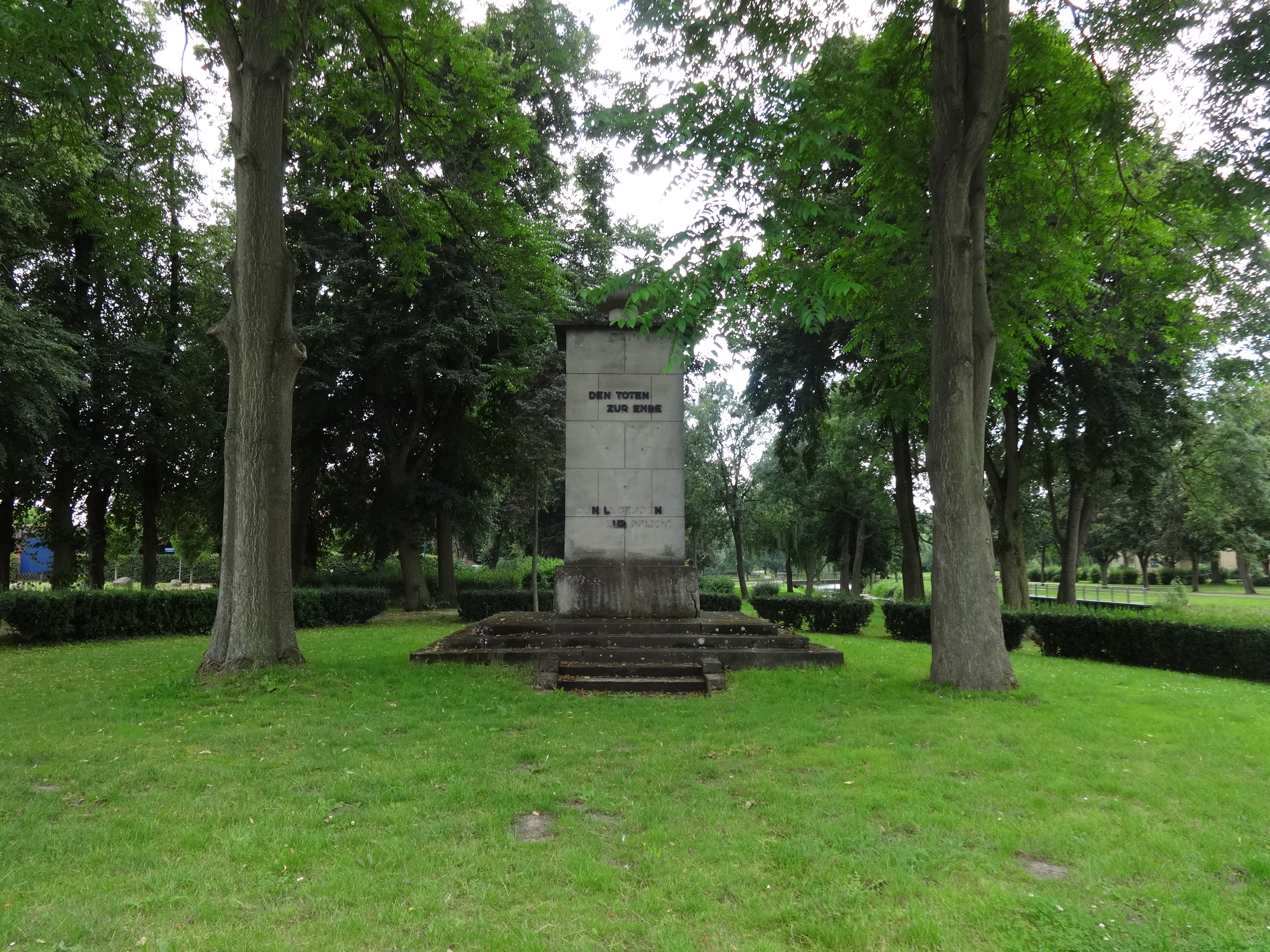 Ehemaliges Heldendenkmal in der Goethestraße in Malchin für die Gefallenen aus dem Ersten Weltkrieg. 1947/1948 zum VVN-Denkmal umgestalten.